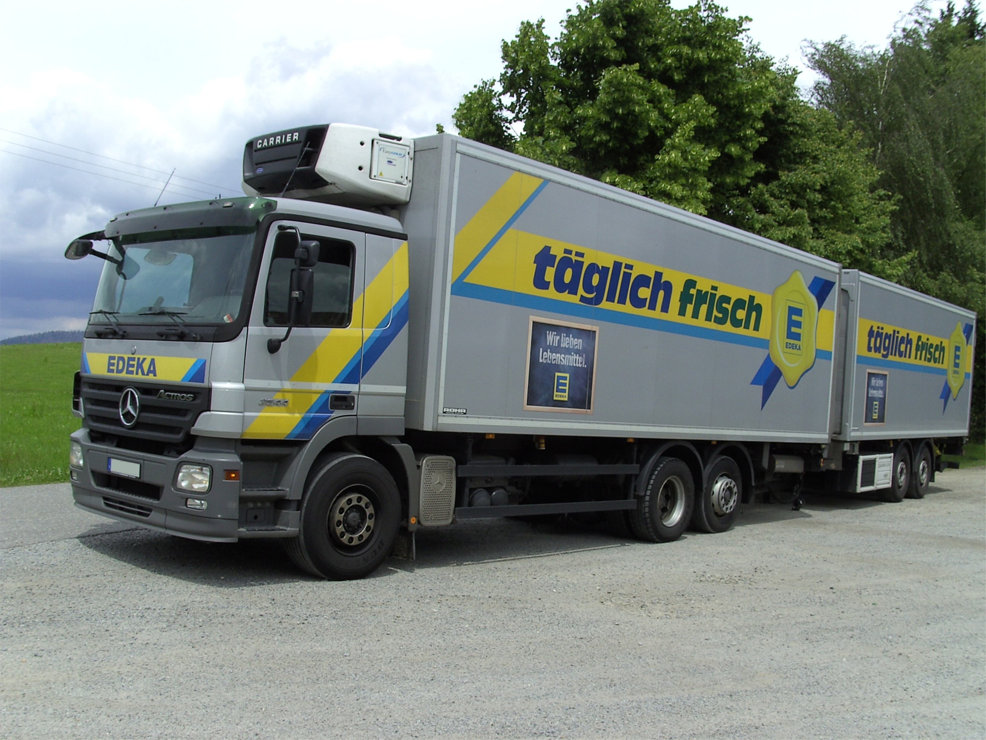 Mercedes-Benz Actros-LKW (2544) Kühlwagen im Dienste von Edeka.